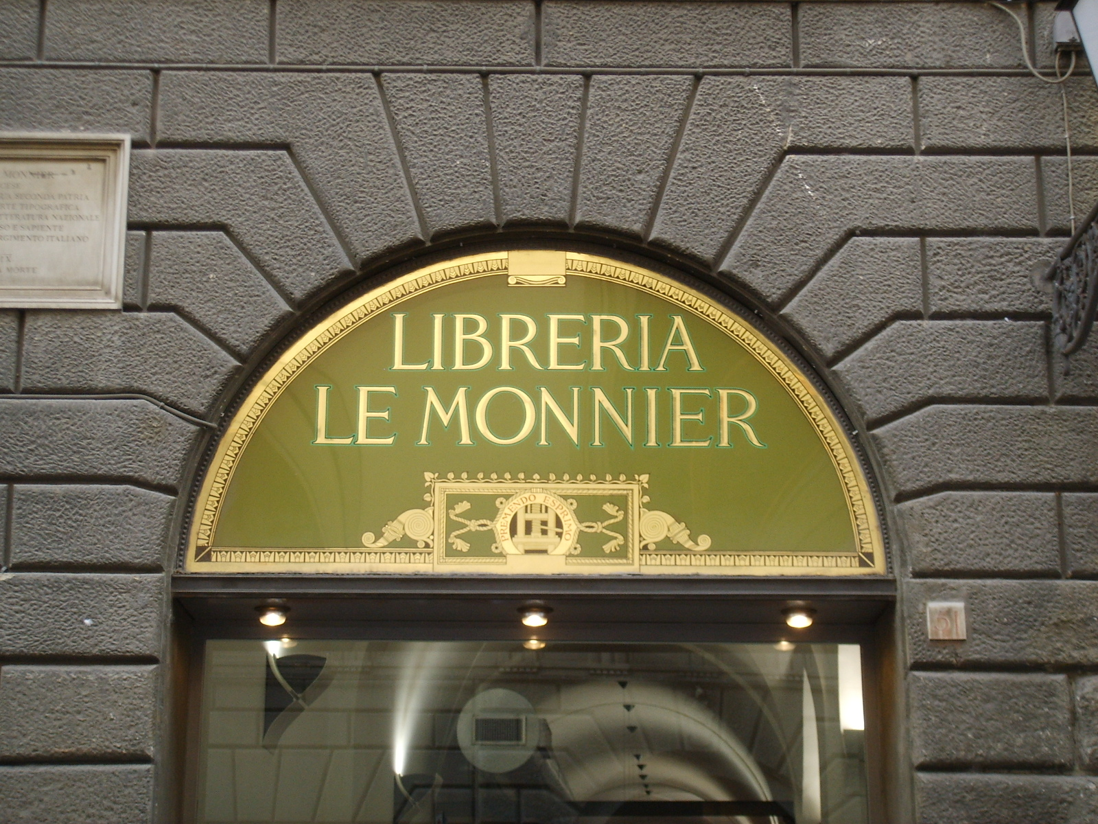 Libreria_le_monnier in Floremce, Italy